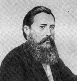 Вессель Николай Христианович (1837-1906), российский педагог и публицист.